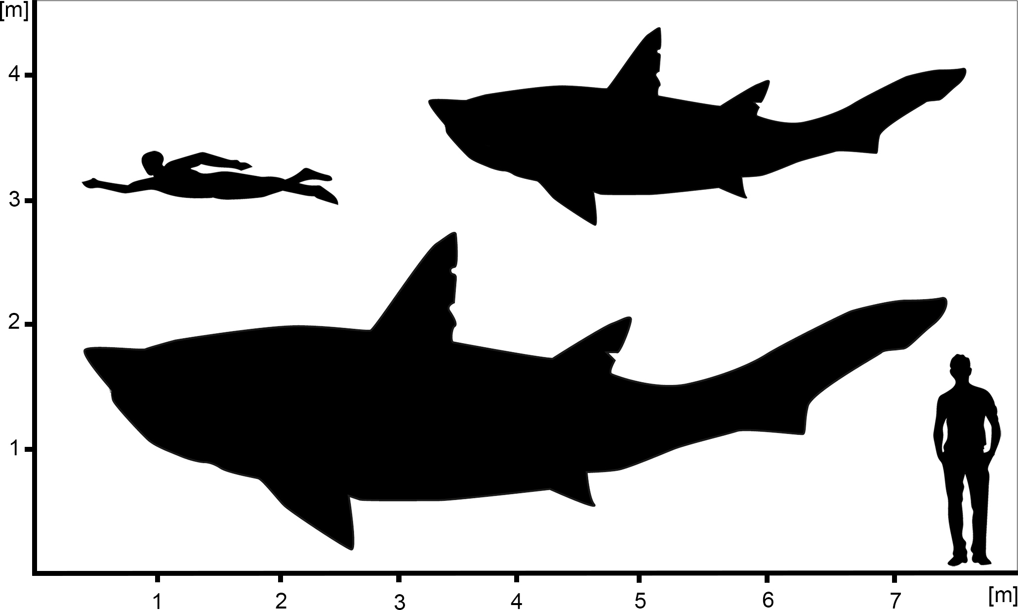 Fig. 4. Longitud total estimada para el tiburón ptychodontid examinado de España. Contornos hipotéticos de † Ptychodus sp. mostrando las estimaciones de tamaño mínimo y máximo para la muestra EMRG-Chond-SK-1.